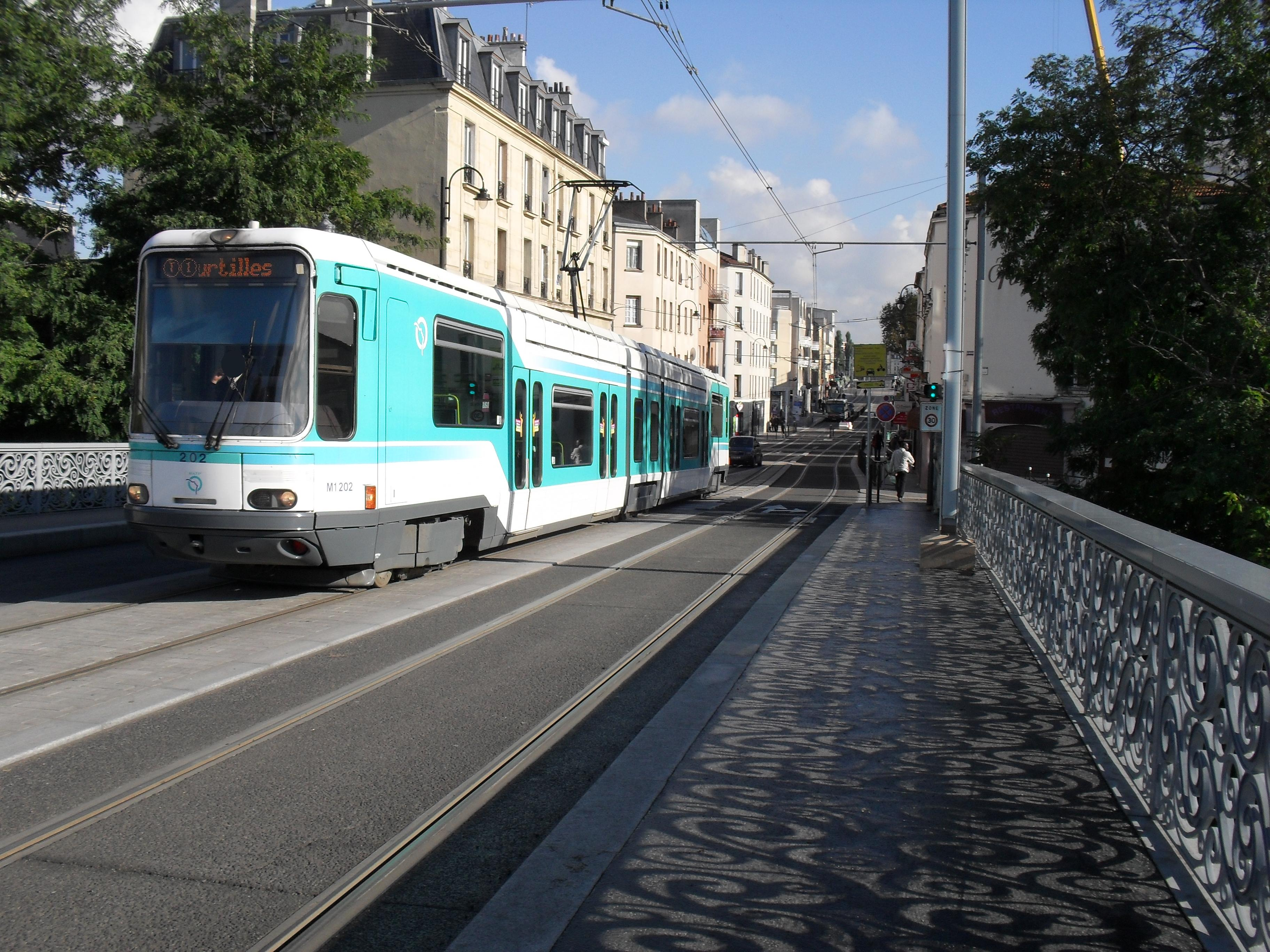 Paris Tramway ligne 1